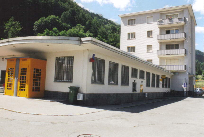 Bahnhof von Poschiavo am de:22. Juni de:2003.